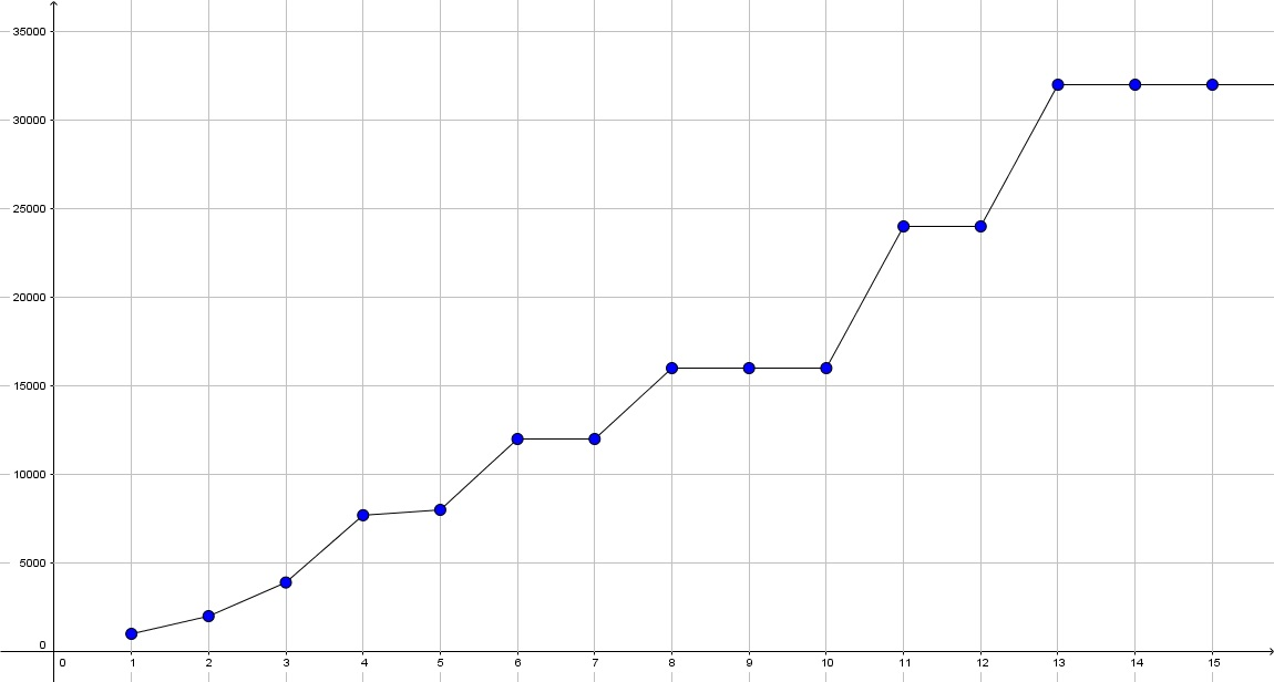 麻雀の得点（30符）